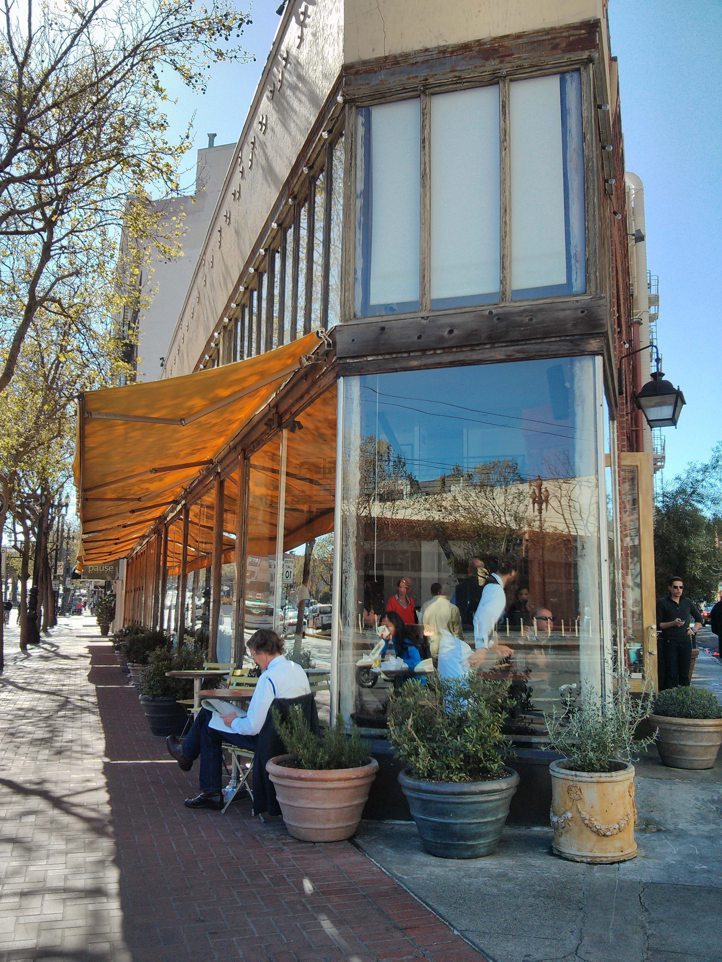 Zuni cafe